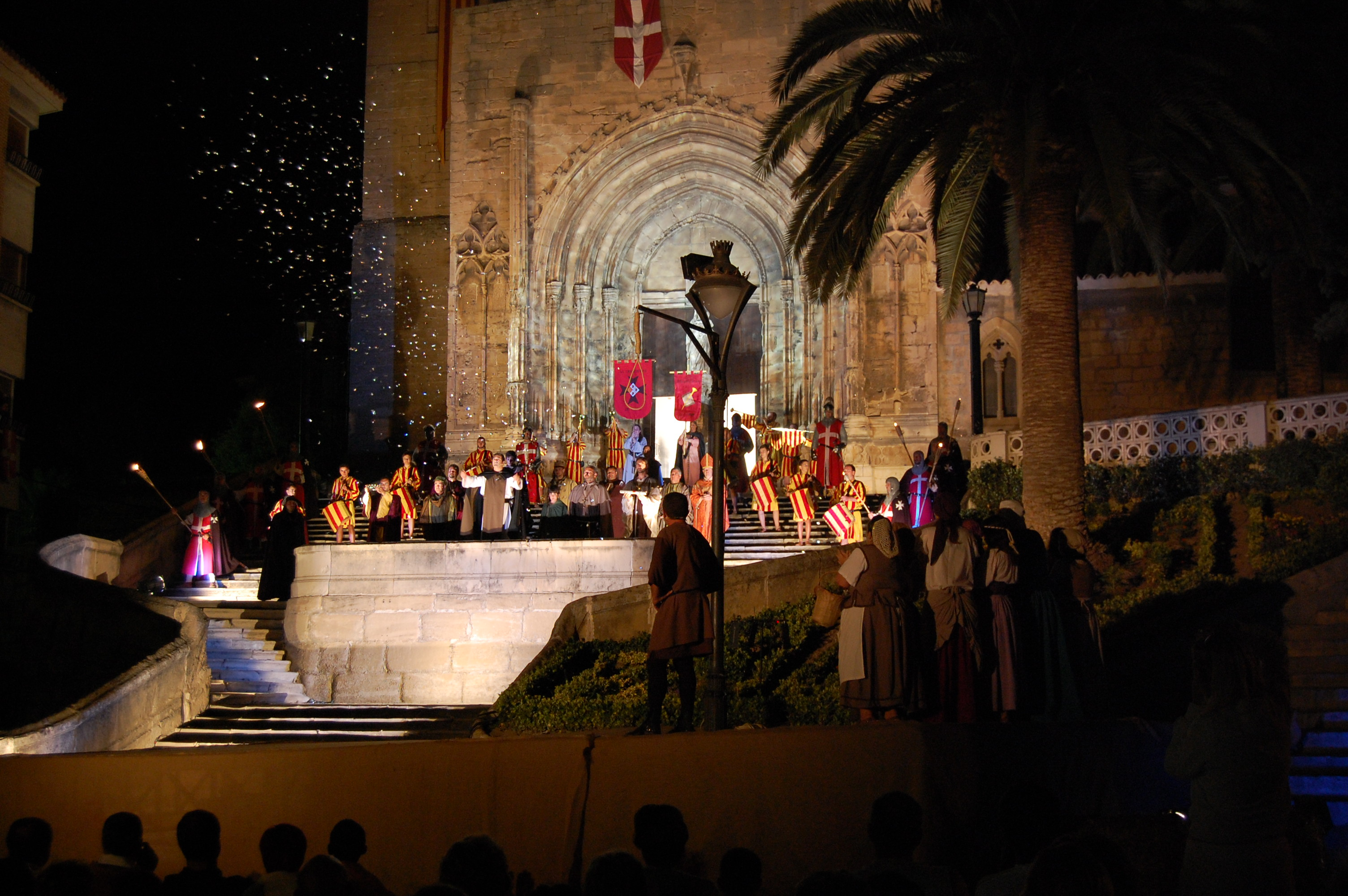 Recreación del Compromiso de Caspe